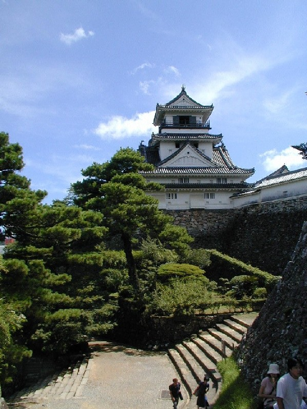 Kochi, il castello. Foto scattata da me il 13 agosto 2002.